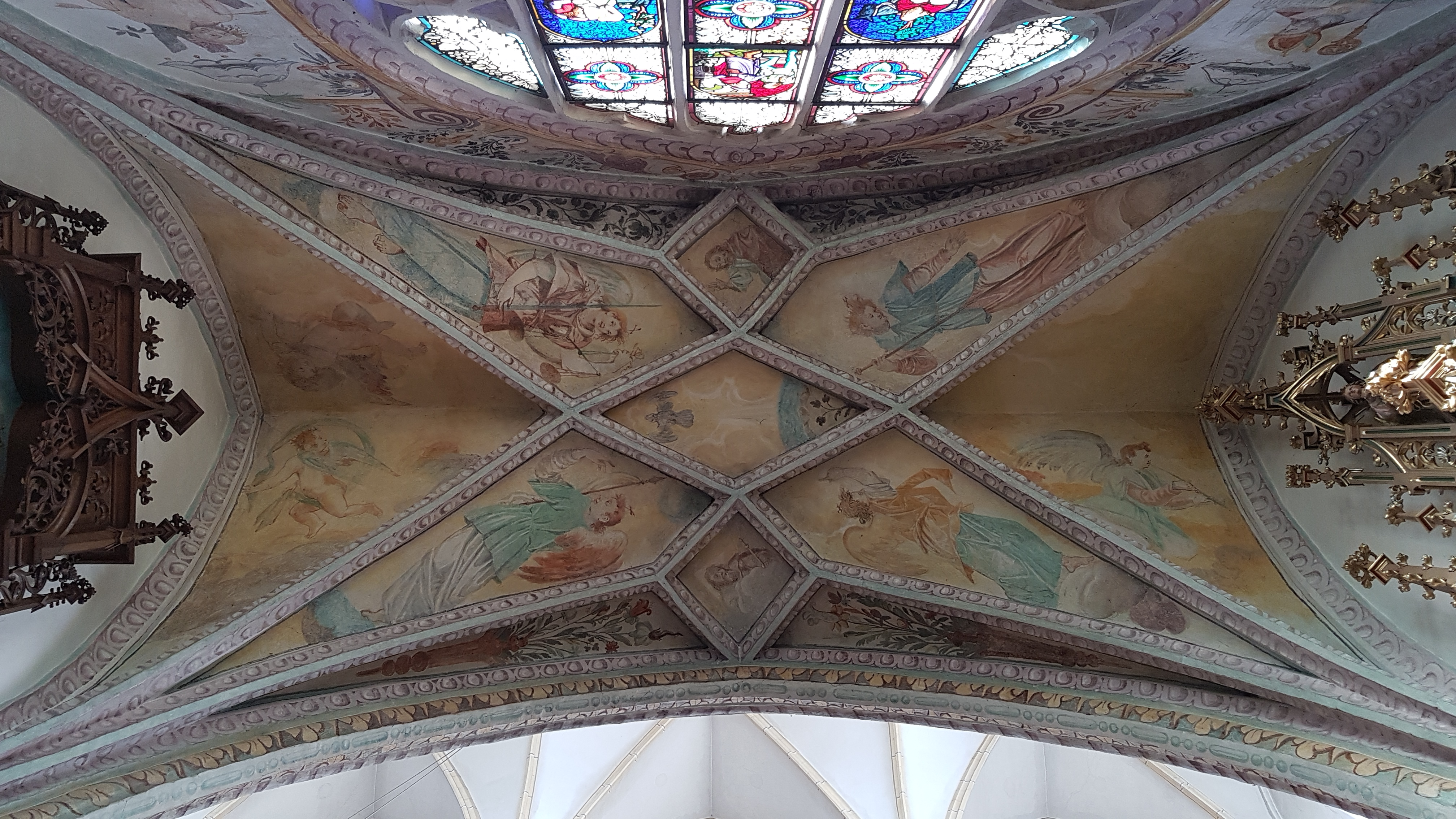 St. Nikolaus (Neuötting)